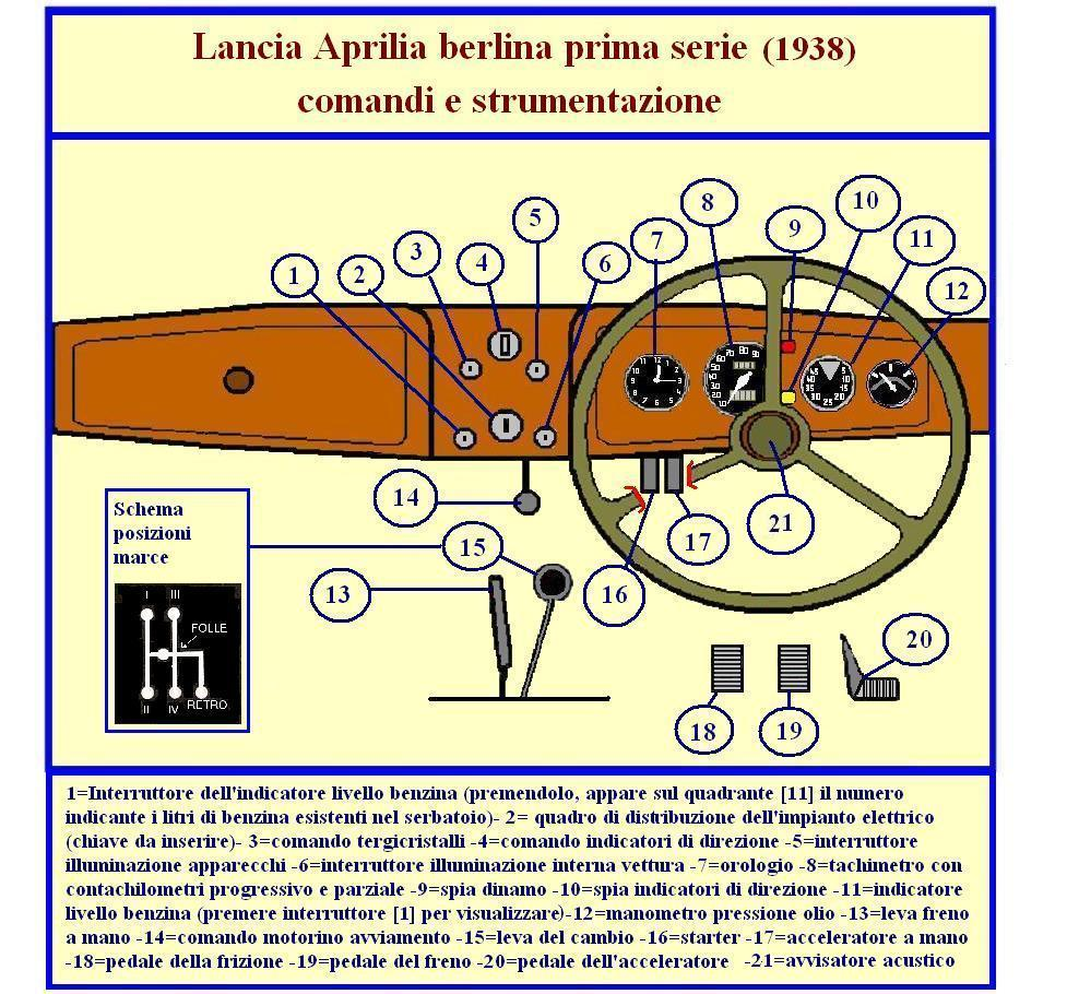 Disegno eseguito dal sottoscritto (Giomayo) utilizzando il programma "Paint" di Windows ispirandomi (ed attingendo i dati necessari) da una serie di pubblicazioni, tra cui principalmente la rivista The Autocar del 25 giugno 1937